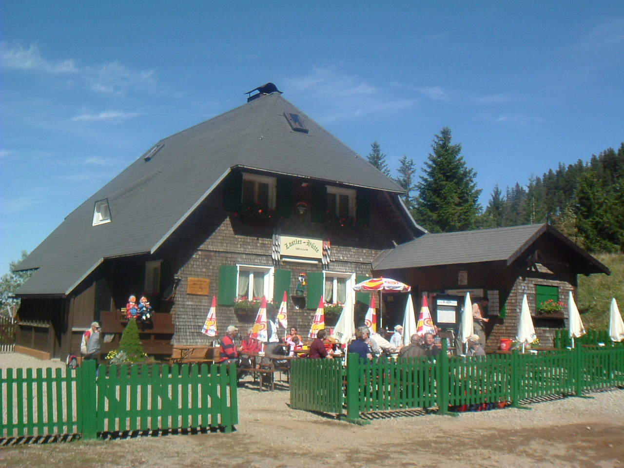 Zastler Hütte mit Außenbewirtung, Blick von vorne